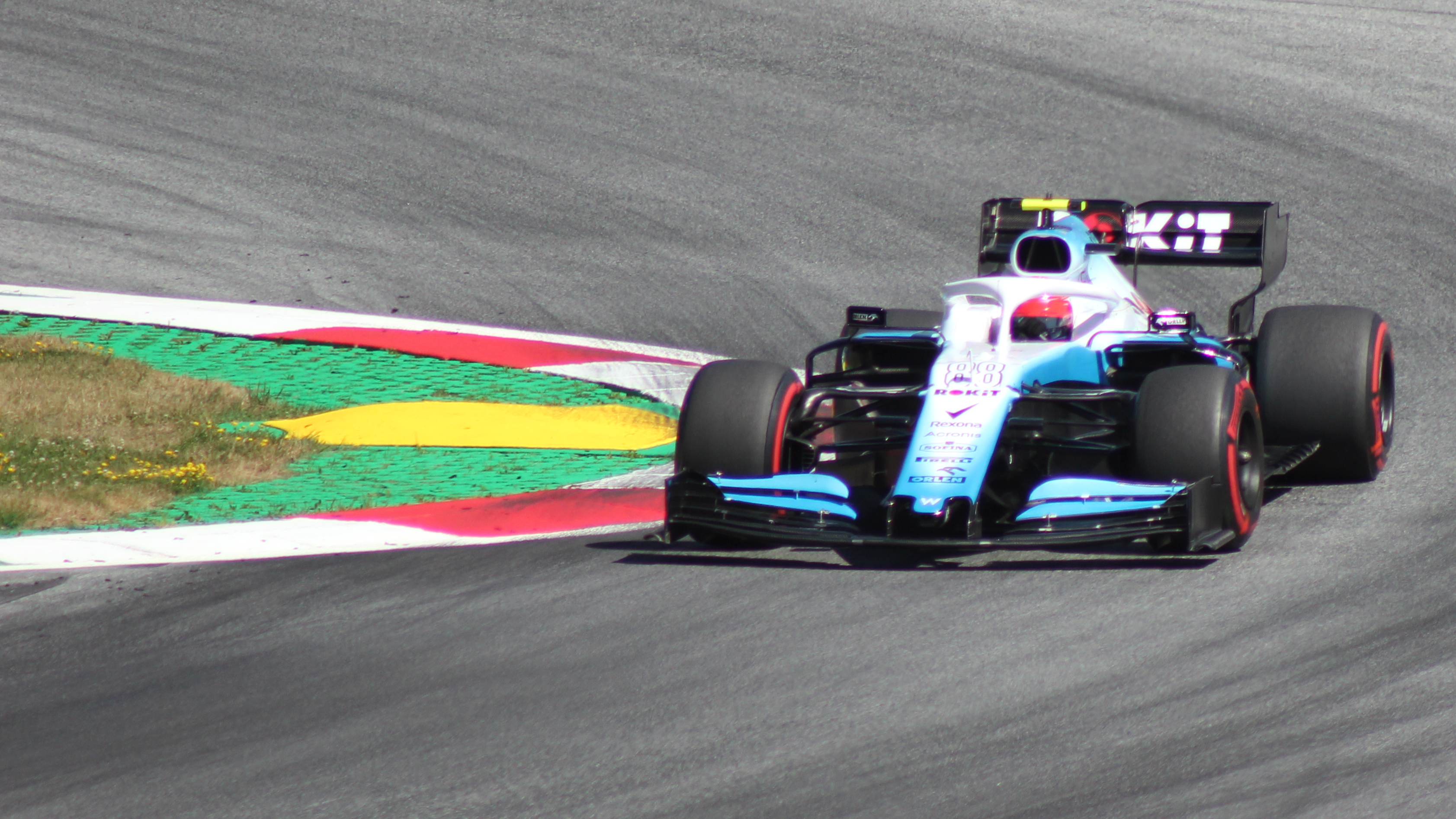 Kubica beim Rennwochenende in Österreich 2019